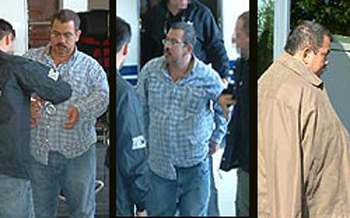 Diego Fernando Murillo alias Don Berna paramilitar y narcotraficante Colombiano extraditado a Estados Unidos el 13 de abril de 2008. From Image:Berna1.jpg Image:Berna2.jpg Image:Berna3.jpg